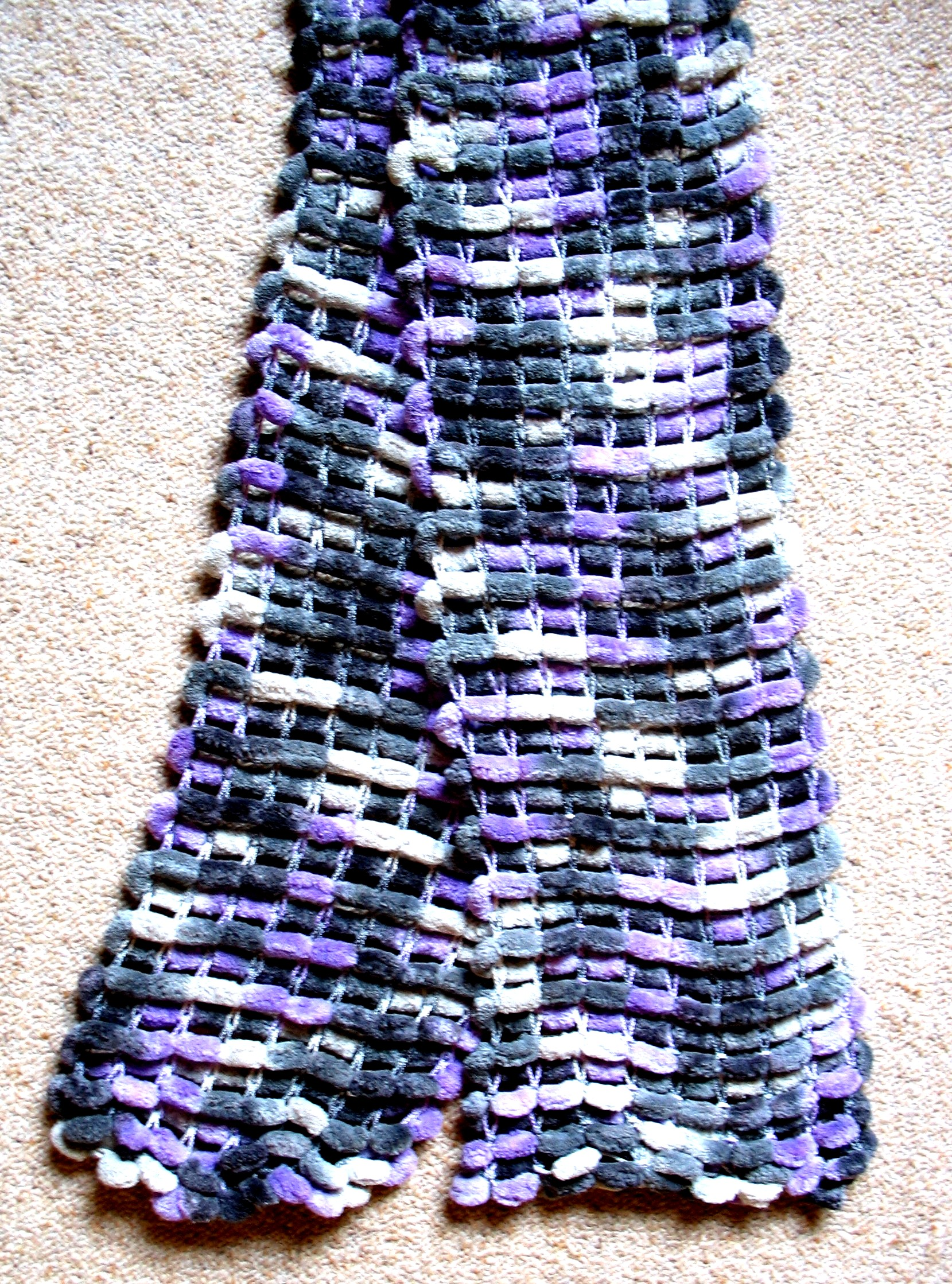 Schal aus Pompongarn